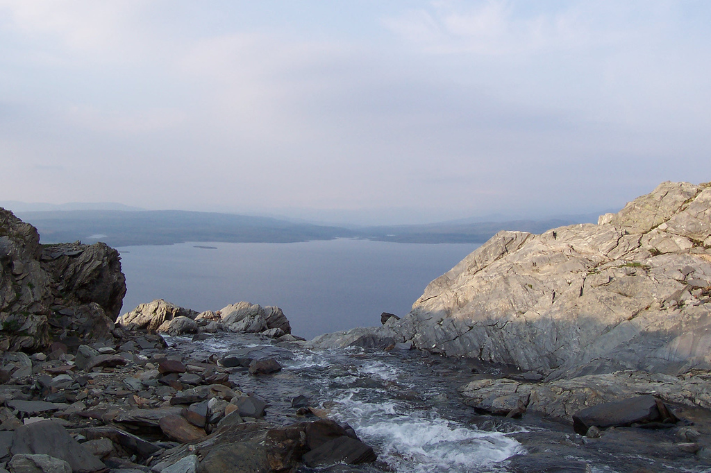 Balvatnet